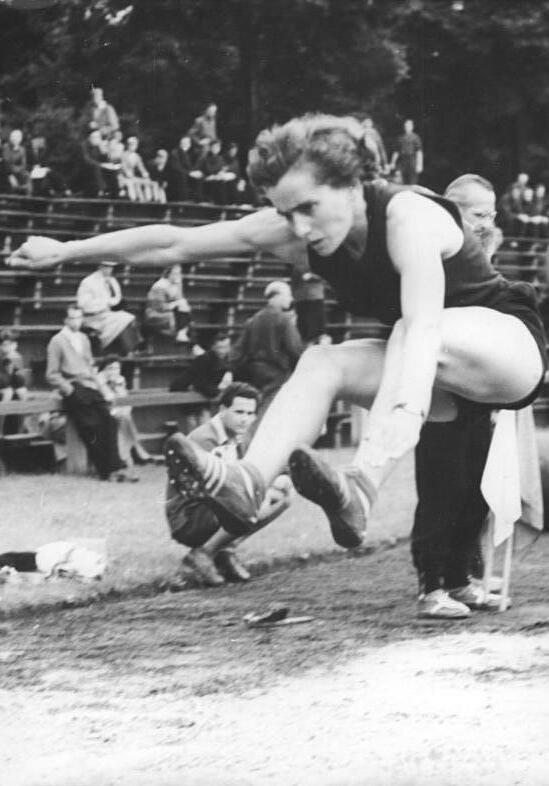 Christa Stubnick Zentralbild Vlocka 22.7.1956 VII. DDR-Leichtathletik-Meisterschaften in Erfurt. In der Zeit vom 20. bis zum 22. Juli 1956 werden in Erfurt die VII. Leichtathletik-Meisterschaften der DDR ausgetragen. UBz: Im Weitsprung der Damen sicherte sich Christa Stubnick mit einer Weite von 5,75 m den Titel. Stubnick (Dynamo Berlin) während des Sprunges.